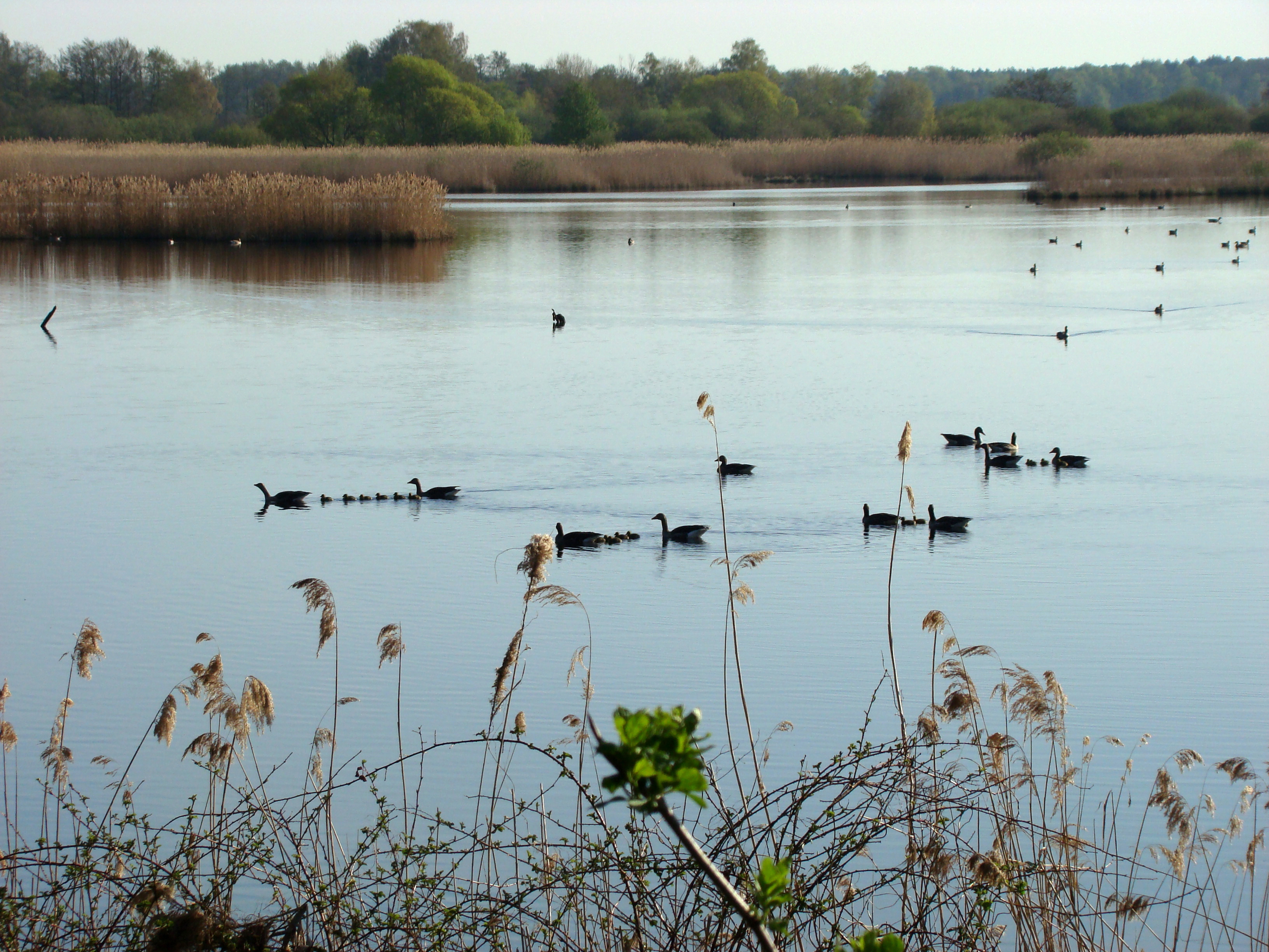 Meißendorfer Teiche mit Graugans-Familien